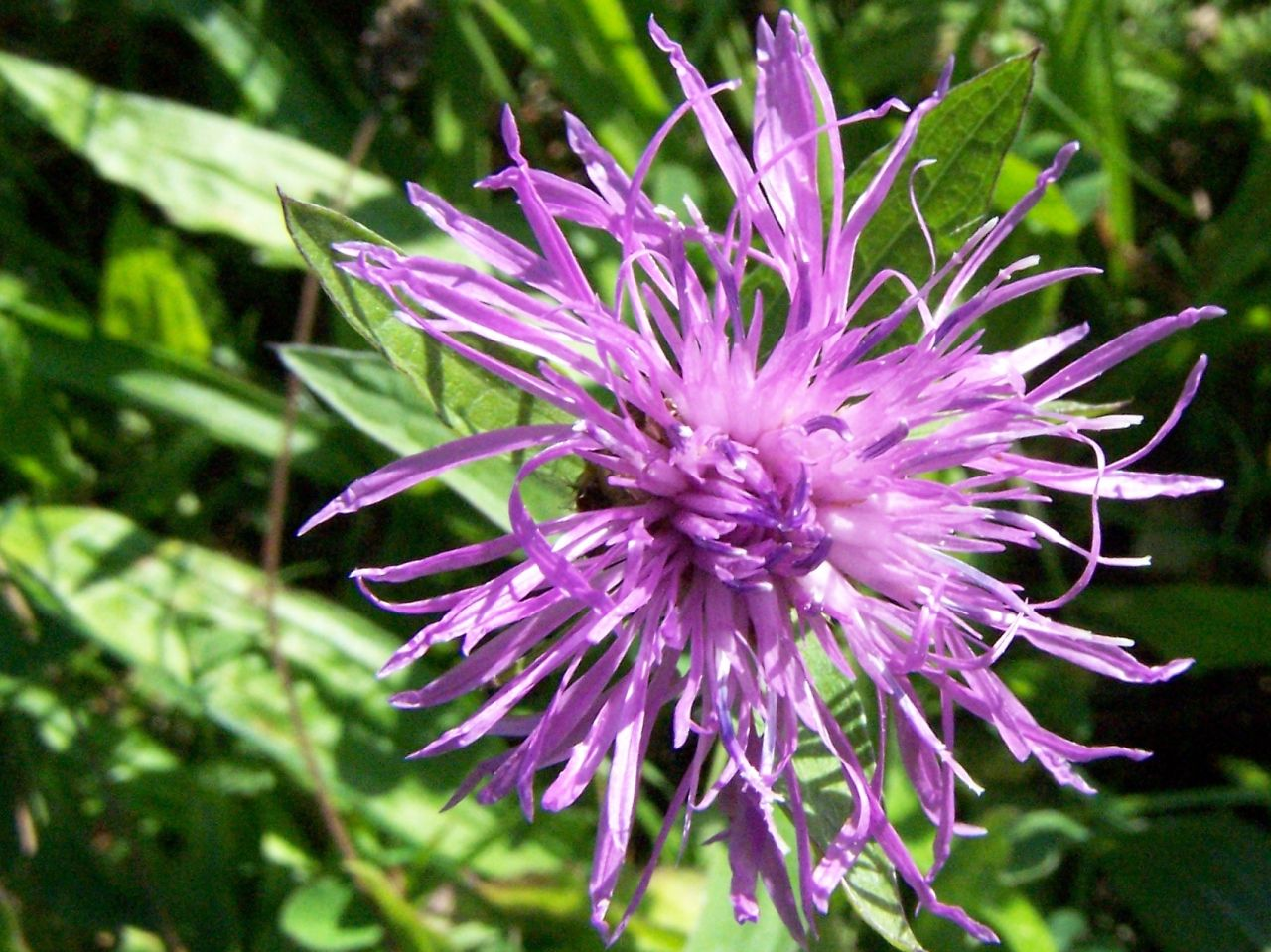 Centaurea scabiosa (pl. chaber driakiewnik)